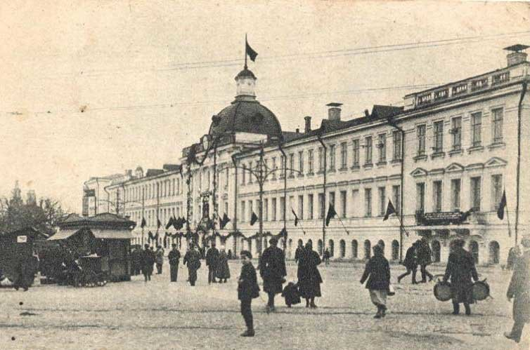 Вид Запасного дворца у Красных ворот